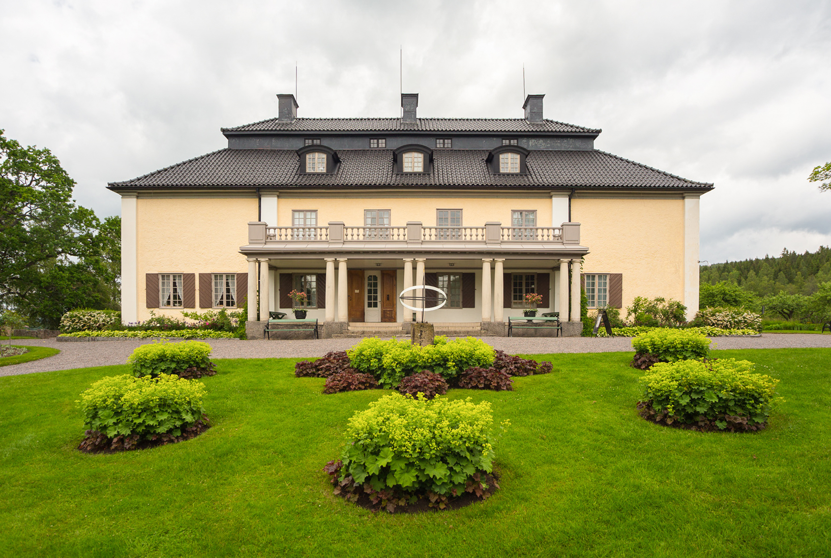 Mårbacka minnesgård. Sunne, Sunne